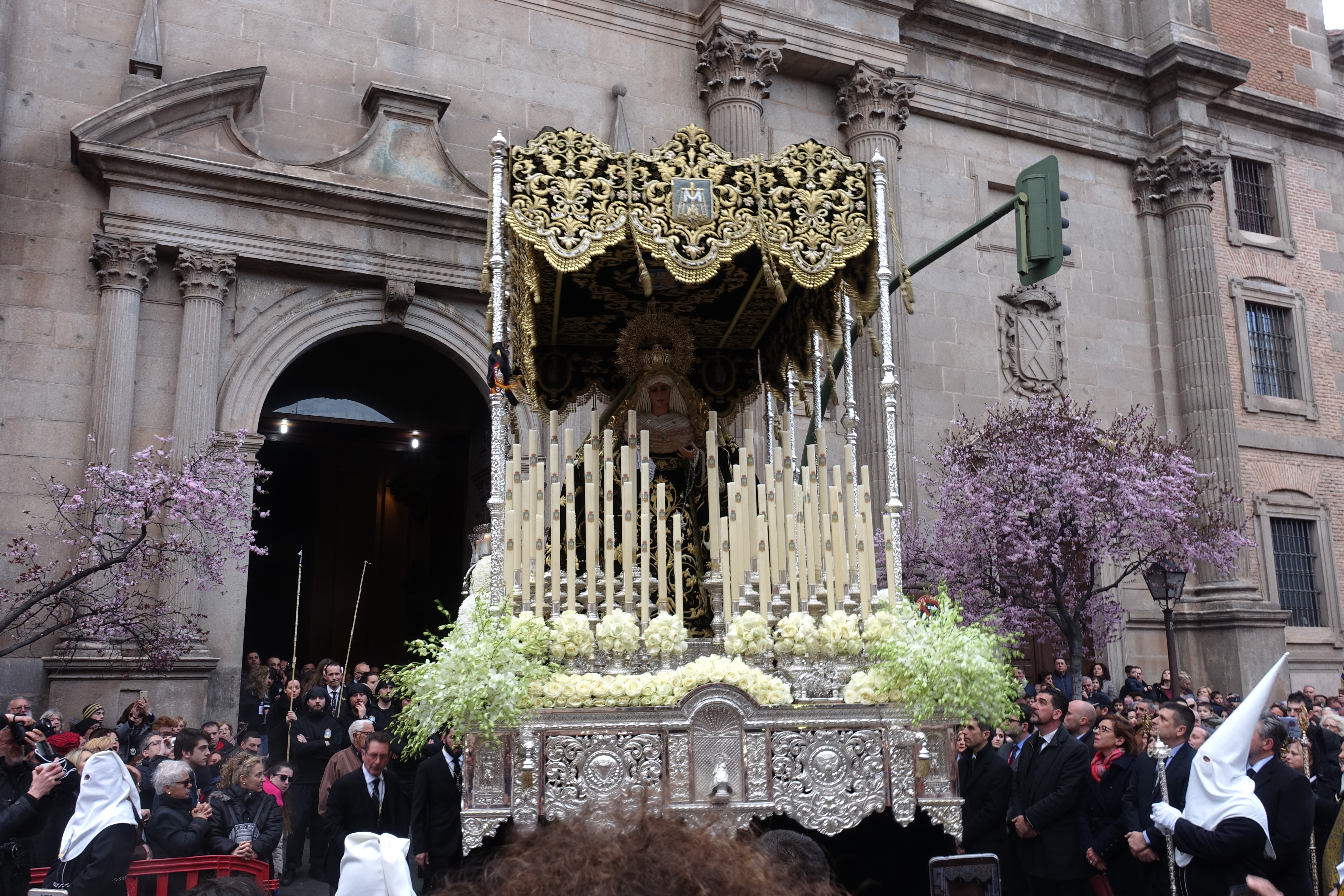 Procesión de la Soledad Coronada y el Sagrado Descendimiento de 2018, durante la Semana Santa de Alcalá de Henares (Madrid, España). This is a photography of a Folklore festival in Spain (Wikidata id Q23453142).